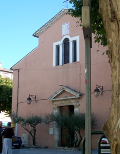 Eglise de Carnoules